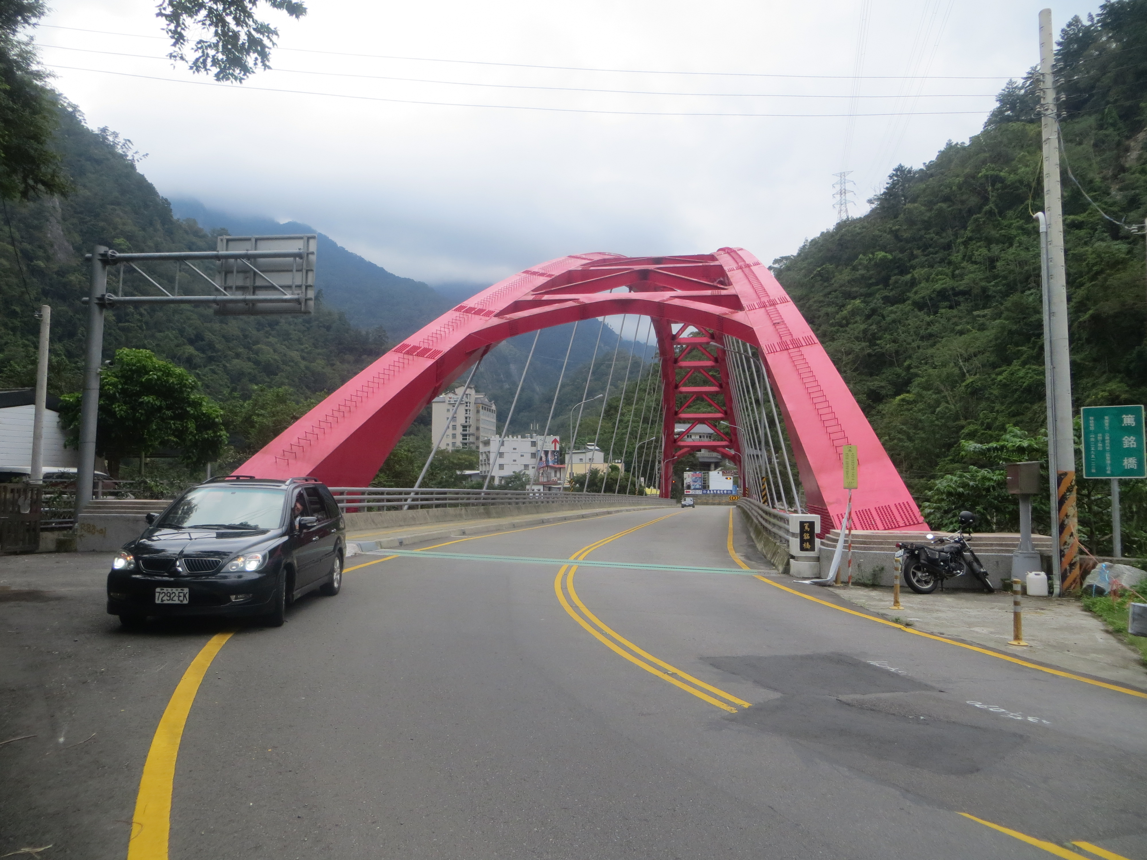 2013年8月25日台8線上拍篤銘橋西端，遠處可見谷關旅館群。